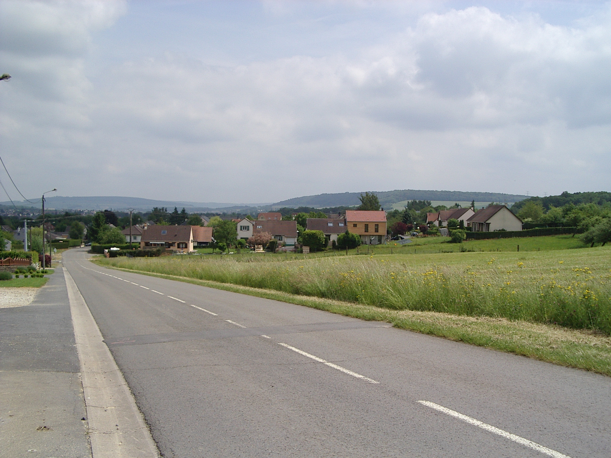 Vue du village d'Elaire depuis la route pour Chalandry